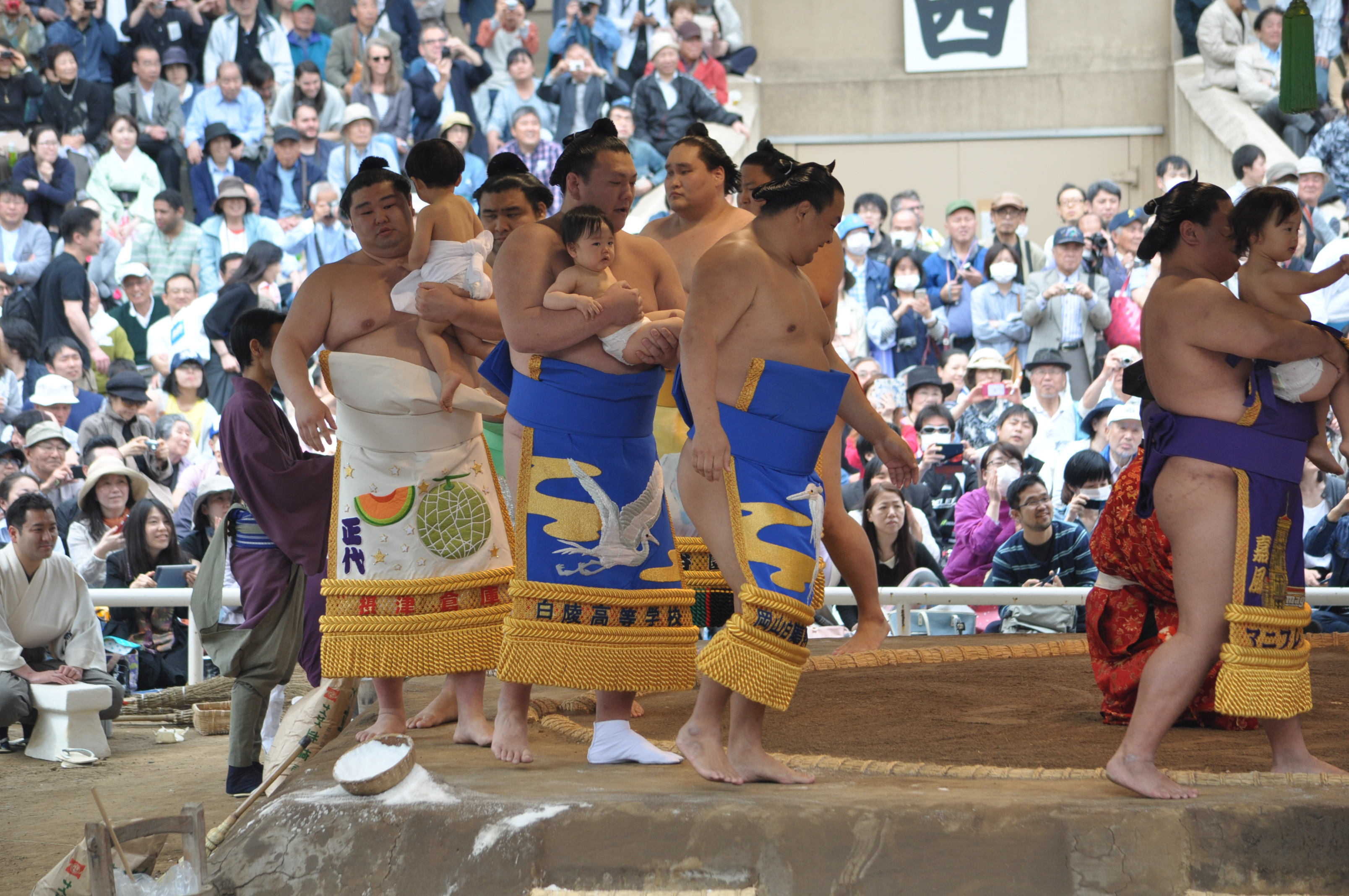 勢 翔太 関